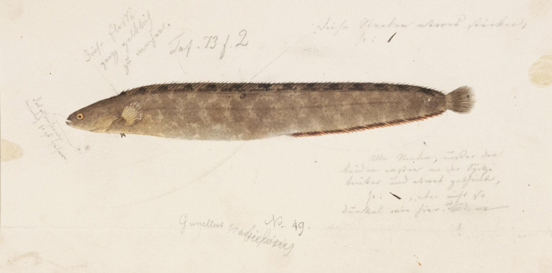 Enedrias nebulosus (Temminck and Schlegel) = Pholis nebulosa